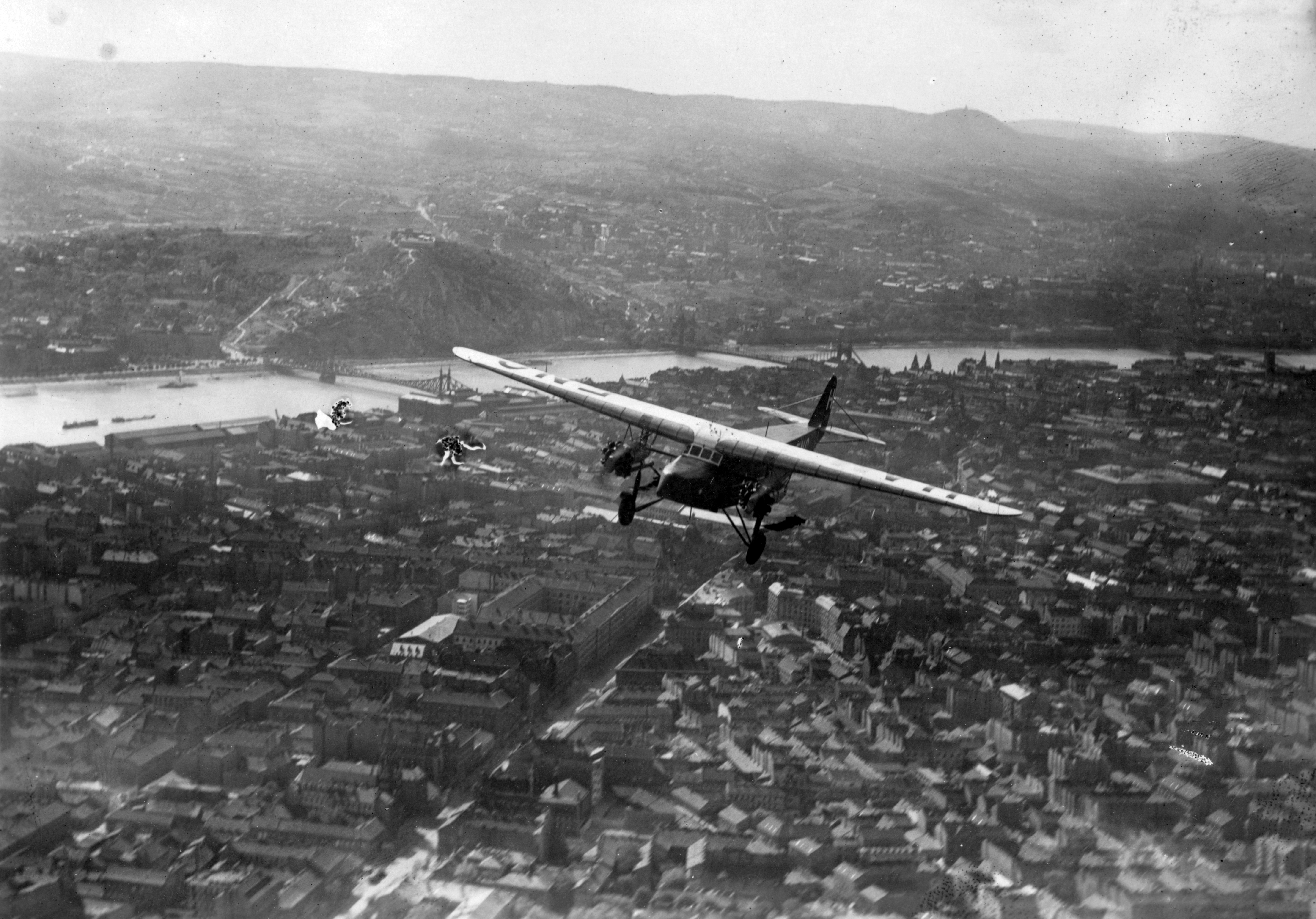 légifotó, előtérben az Üllői út. Magyar gyártású Fokker F-VIIIB típusú utasszállító repülőgép. Location: Hungary, Budapest Tags: airplane, transport, Weiss Manfréd-brand, license, Hungarian brand, aerial photo, bird's eye view Title: légifotó, előtérben az Üllői út. Magyar gyártású Fokker F-VIIIB típusú utasszállító repülőgép.